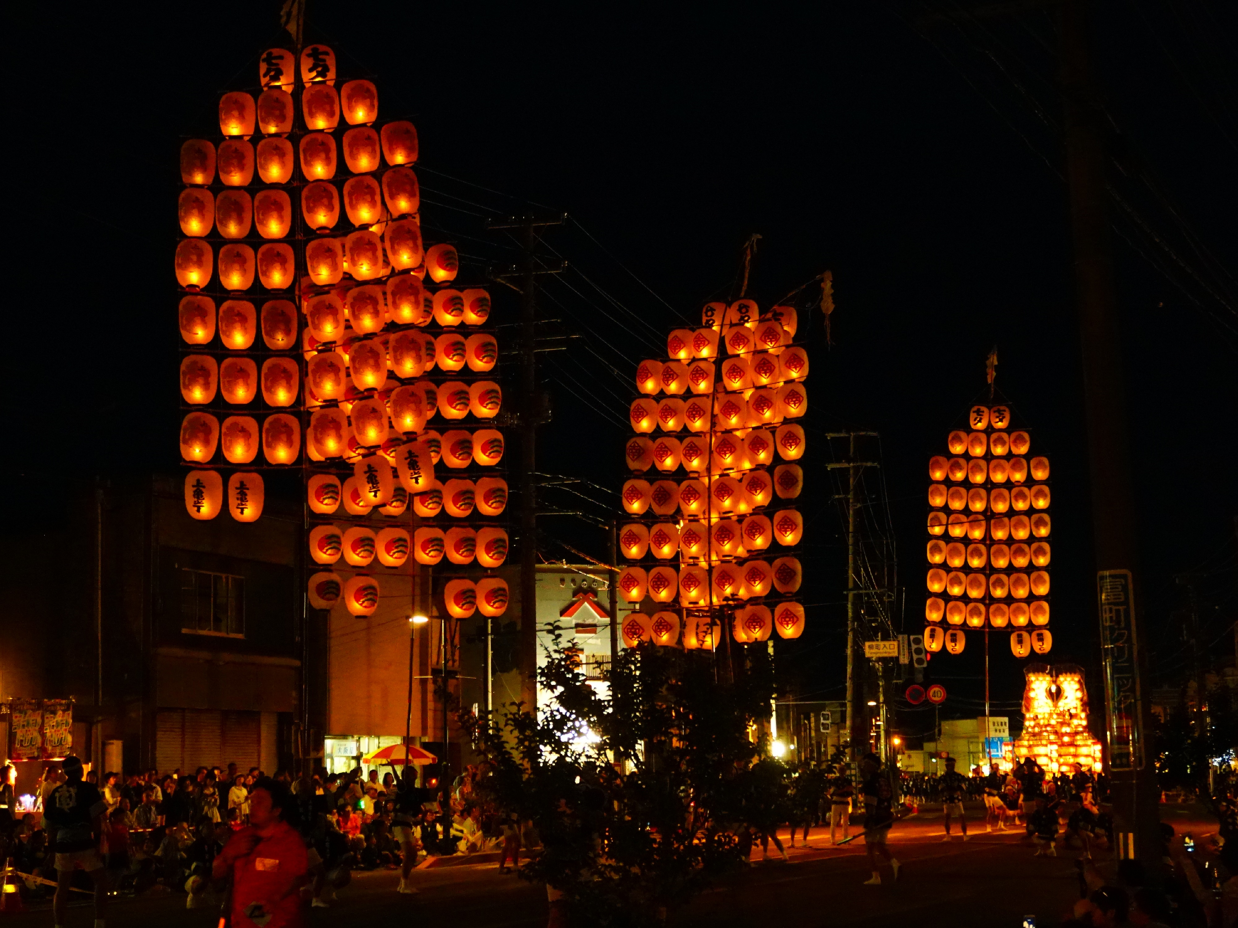 秋田県能代市で開催されるおなごりフェスティバルで実演される竿燈。能代市畠町通りにて This photo has been taken in the country: Japan